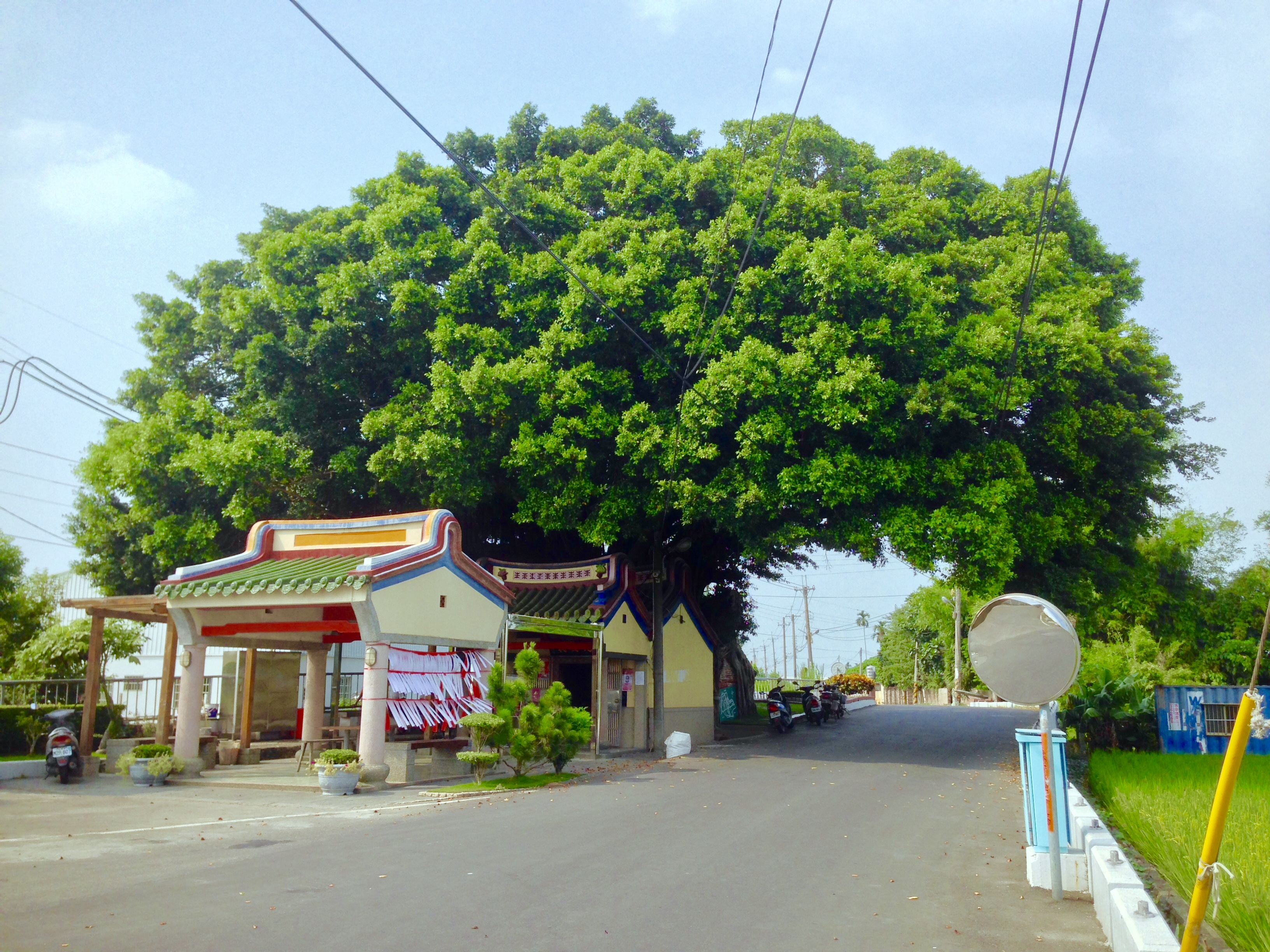 錫安祠拜亭、新廟與舊廟斜照。